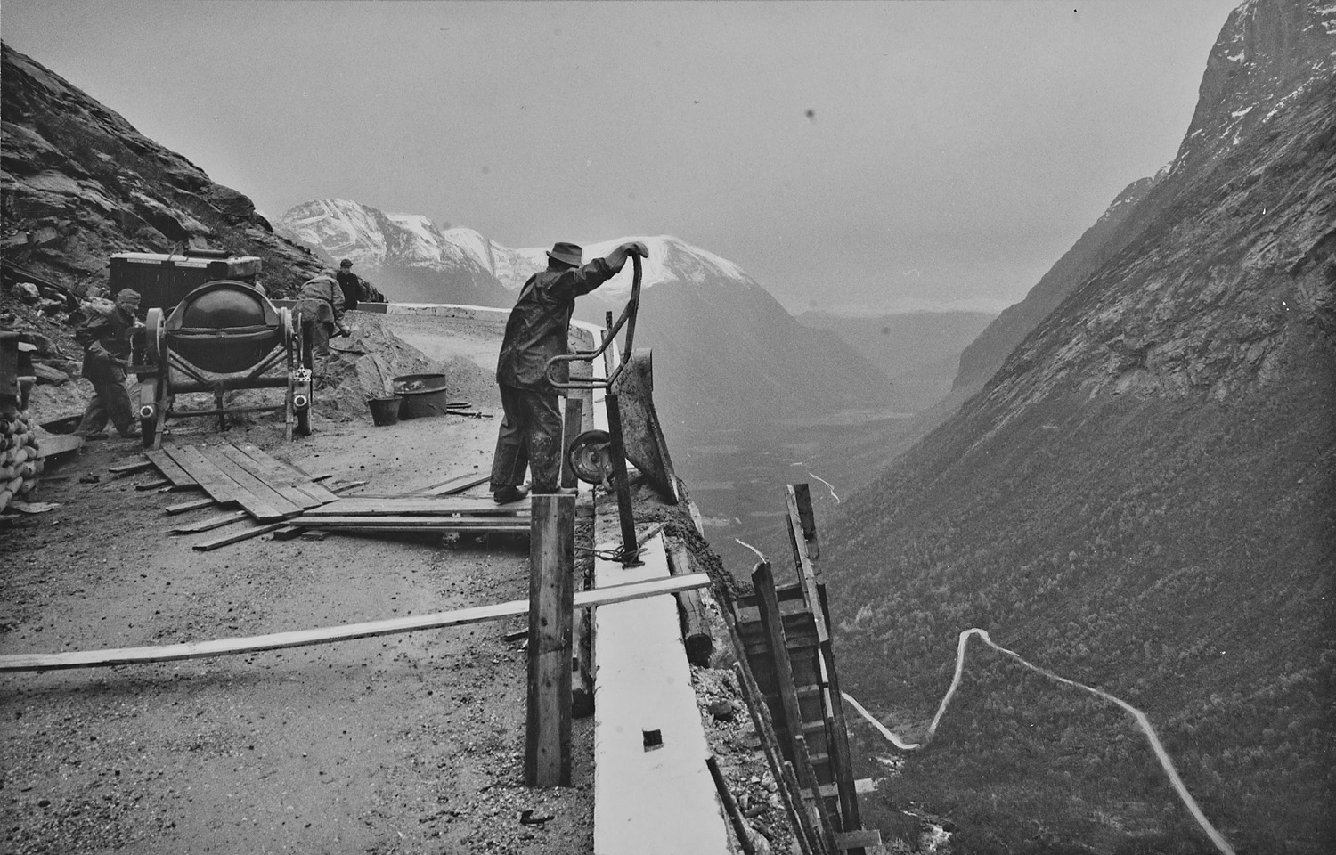 Fotograf: Arne Knudsen, Knudsens fotosenter. Arkivreferanse: Riksarkivet, neg. 43485. Pa 1543 – Norsk Sprængstofindustri A/S, uordnet. url